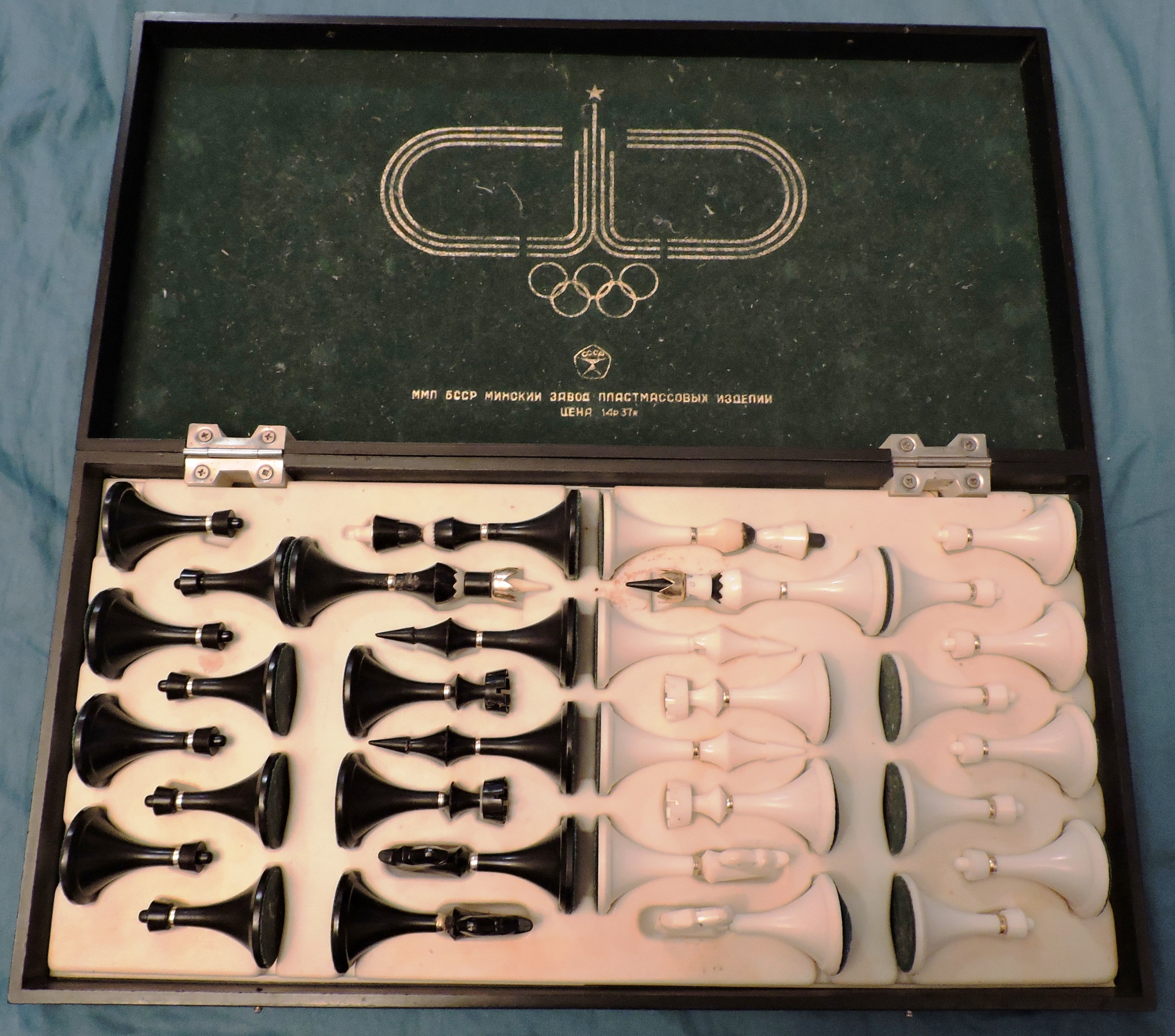 Шахматы в формочке